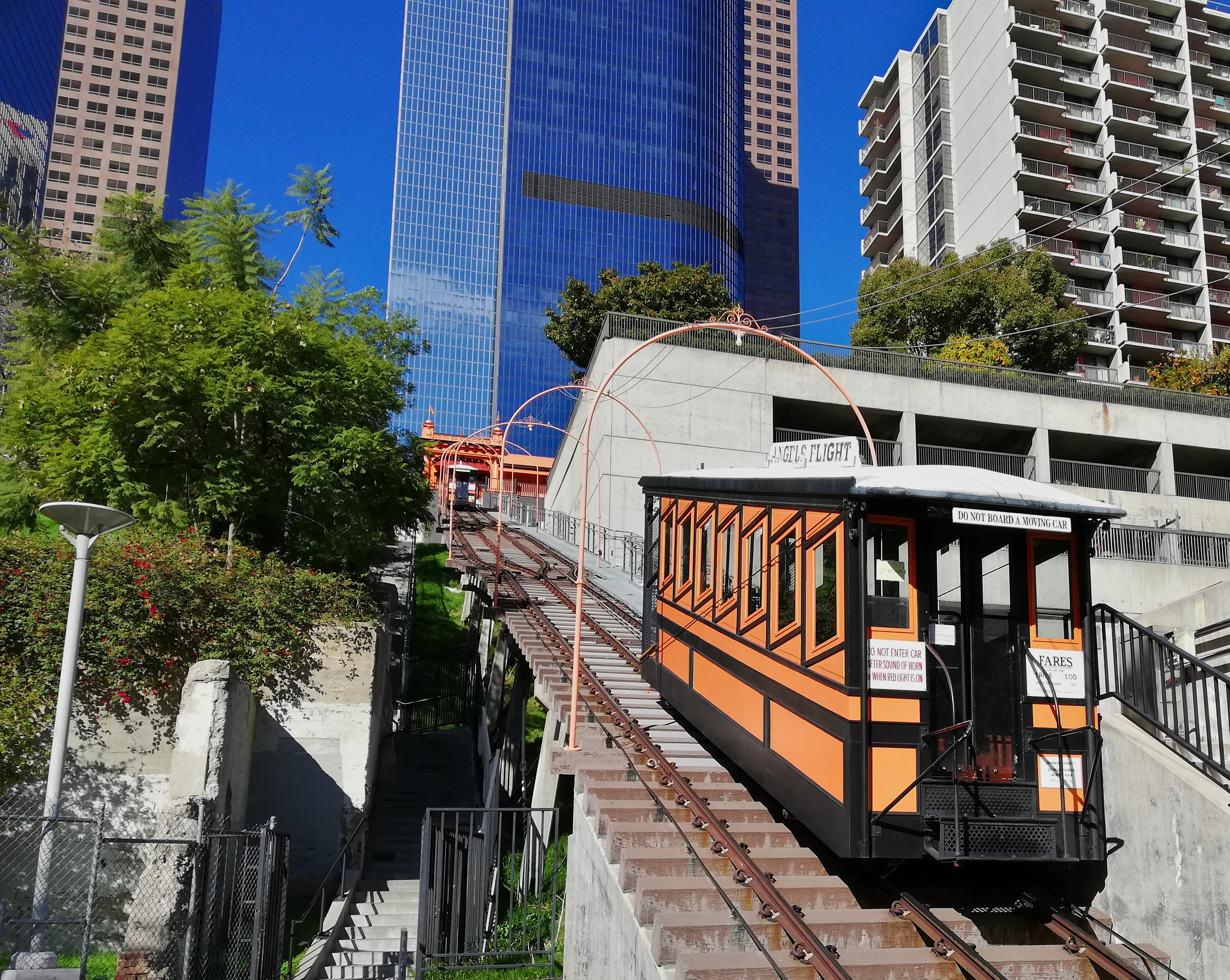 Le Angels Flight à Los Angeles en 2019